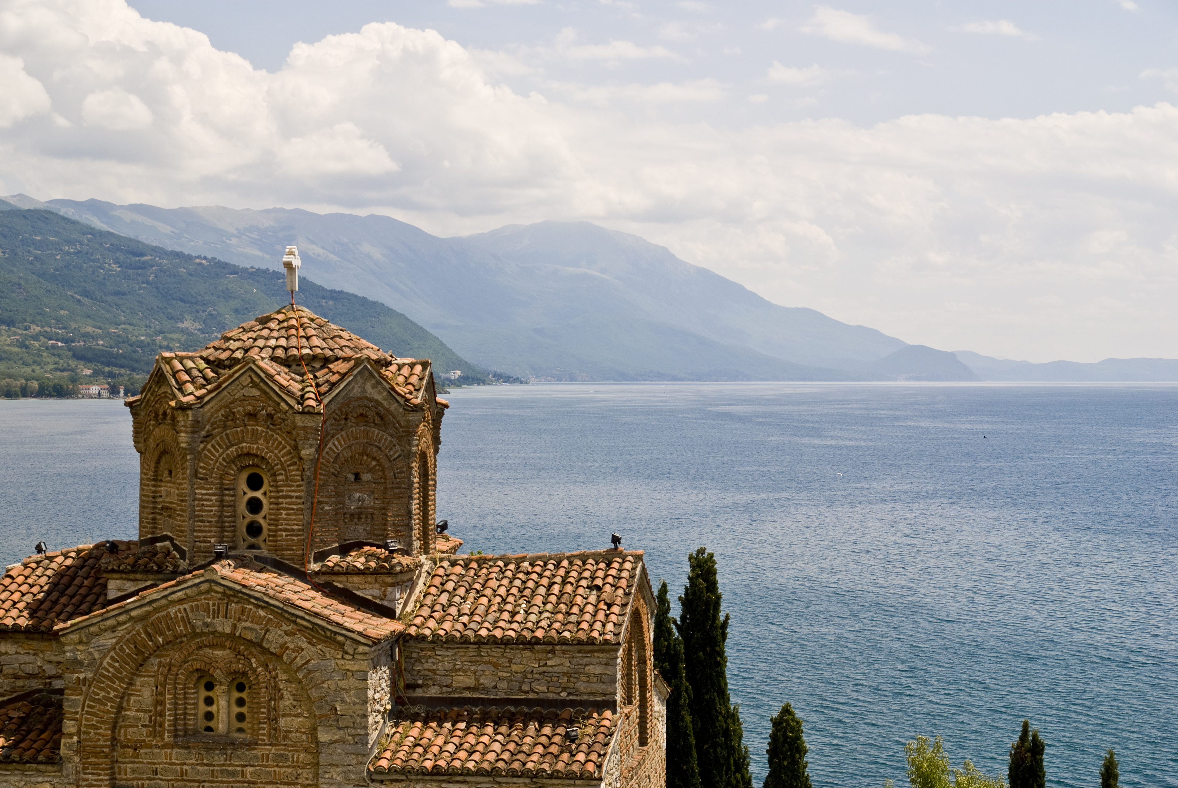 Sveti Jovan Kaneo & Lake Ohrid, Macedonia